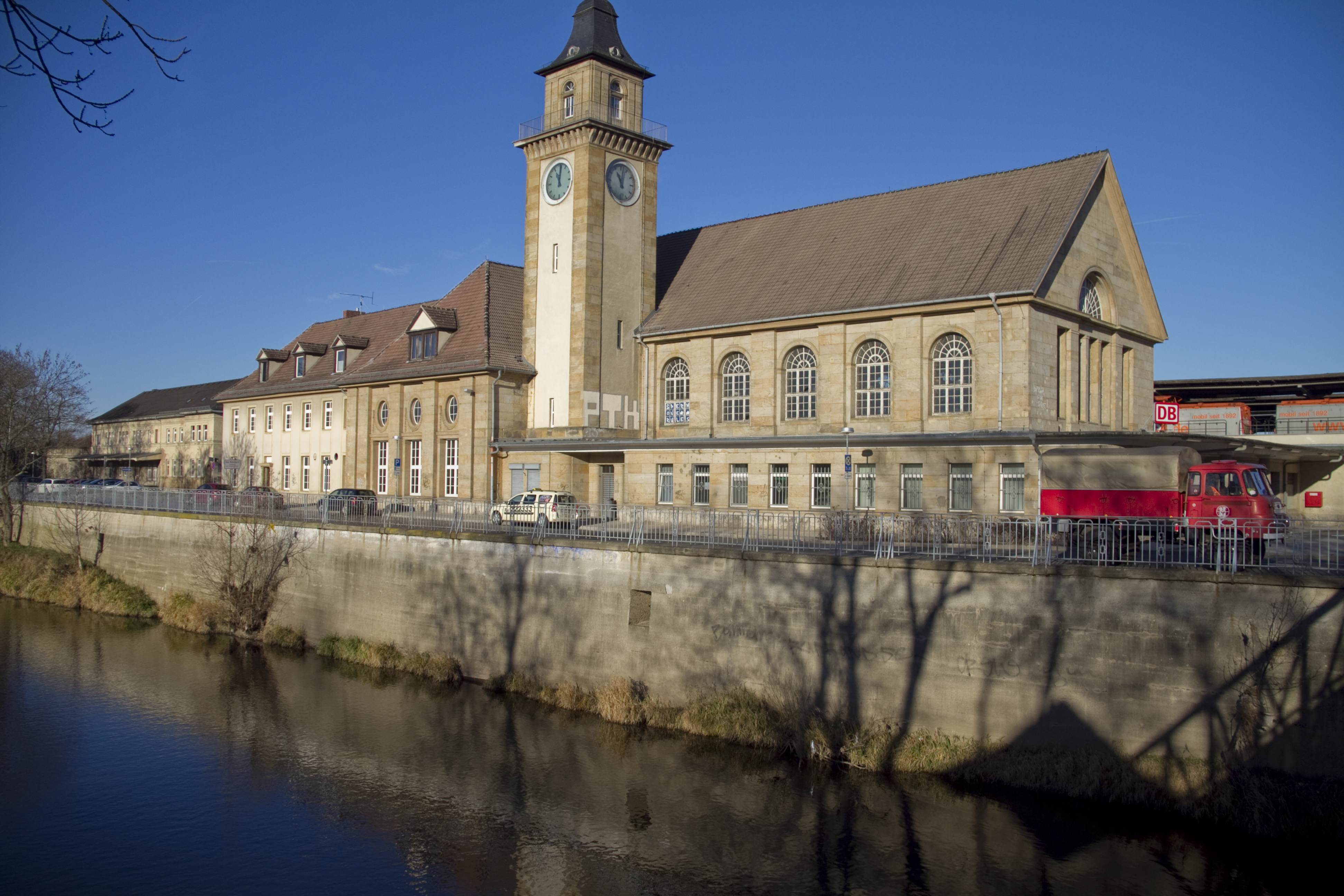 Bahnhof Zeitz, Empfangsgebäude